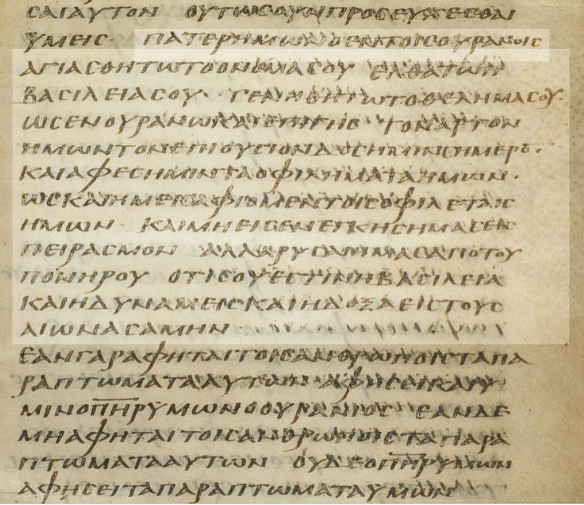 «Πάτερ Ημών» ,Codex Washingtonianus, 032